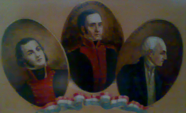 Representa a los principales gestores de la independencia de Paraguay: Yegros, Francia y Caballero.